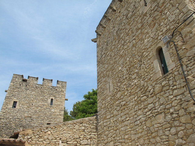 Castell Rocafort de Queralt a la Conca de Barberà - Catalunya